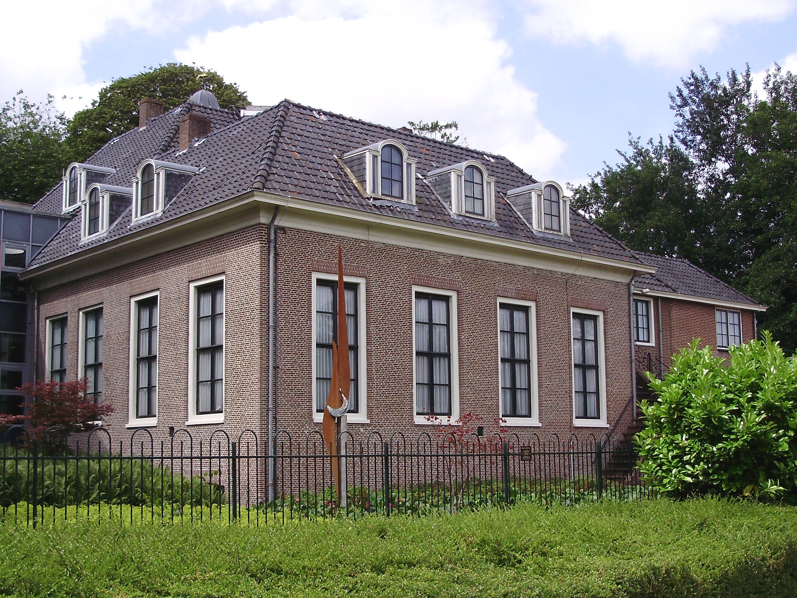 De Herema State in Joure (provincie Friesland, Nederland)